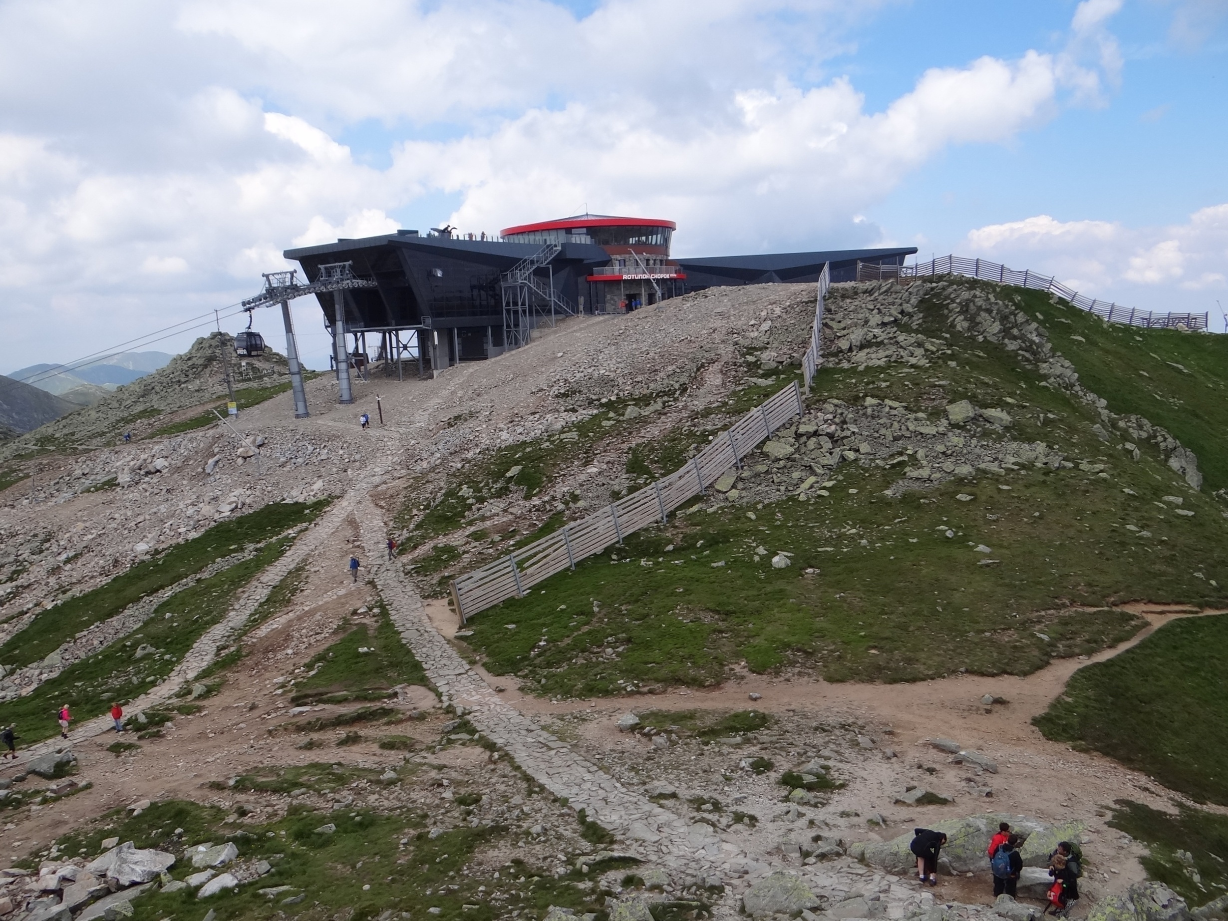 Górna stacja kolei linowej na Chopoka